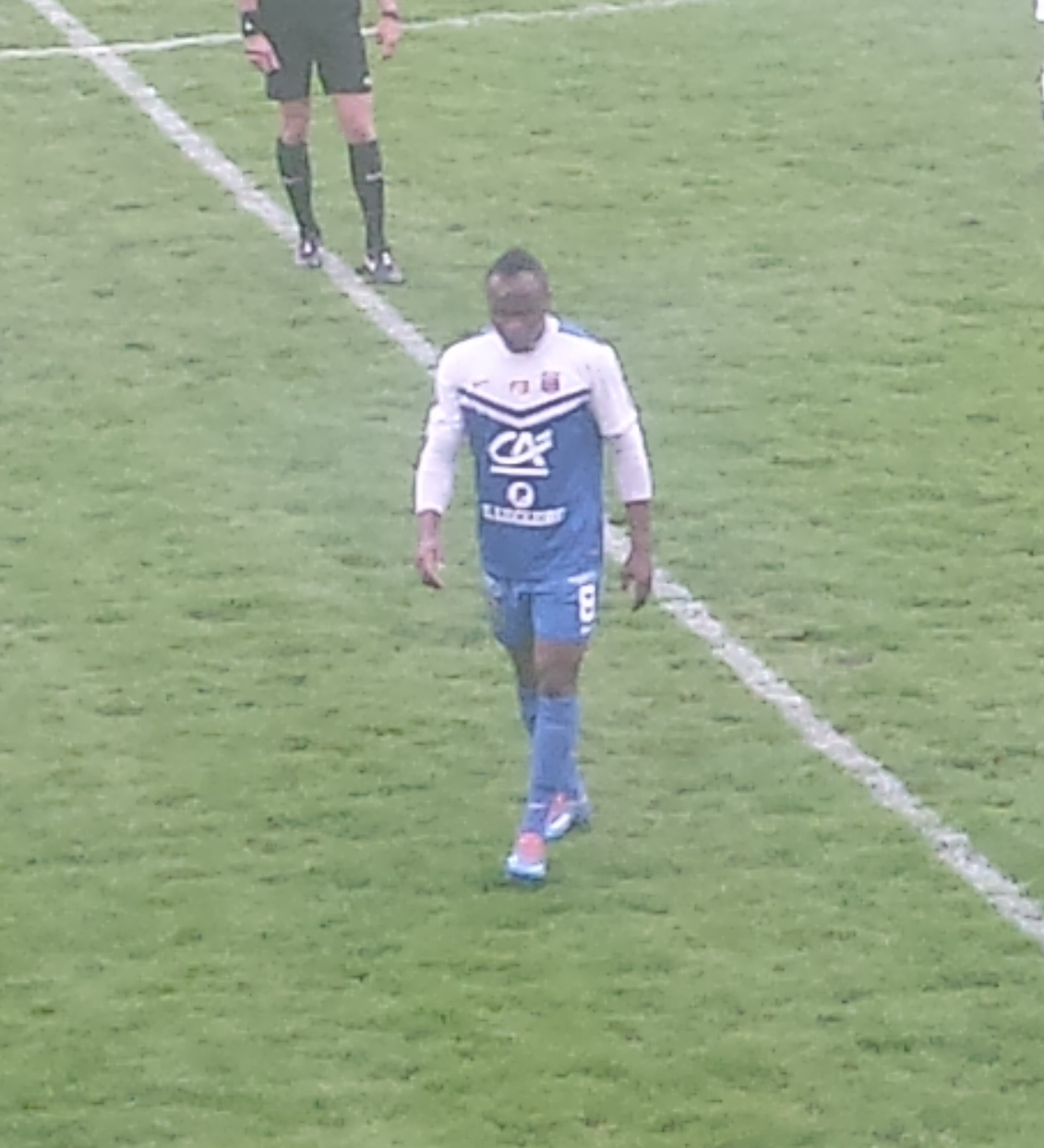 Pascal Razakanantenaina lors du match Arras / Romorantin, le 25 avril 2015, au Stade Degouve-Brabant d'Arras, comptant pour la vingt-sixième journée du championnat de France amateur de football ou CFA (quatrième division française).